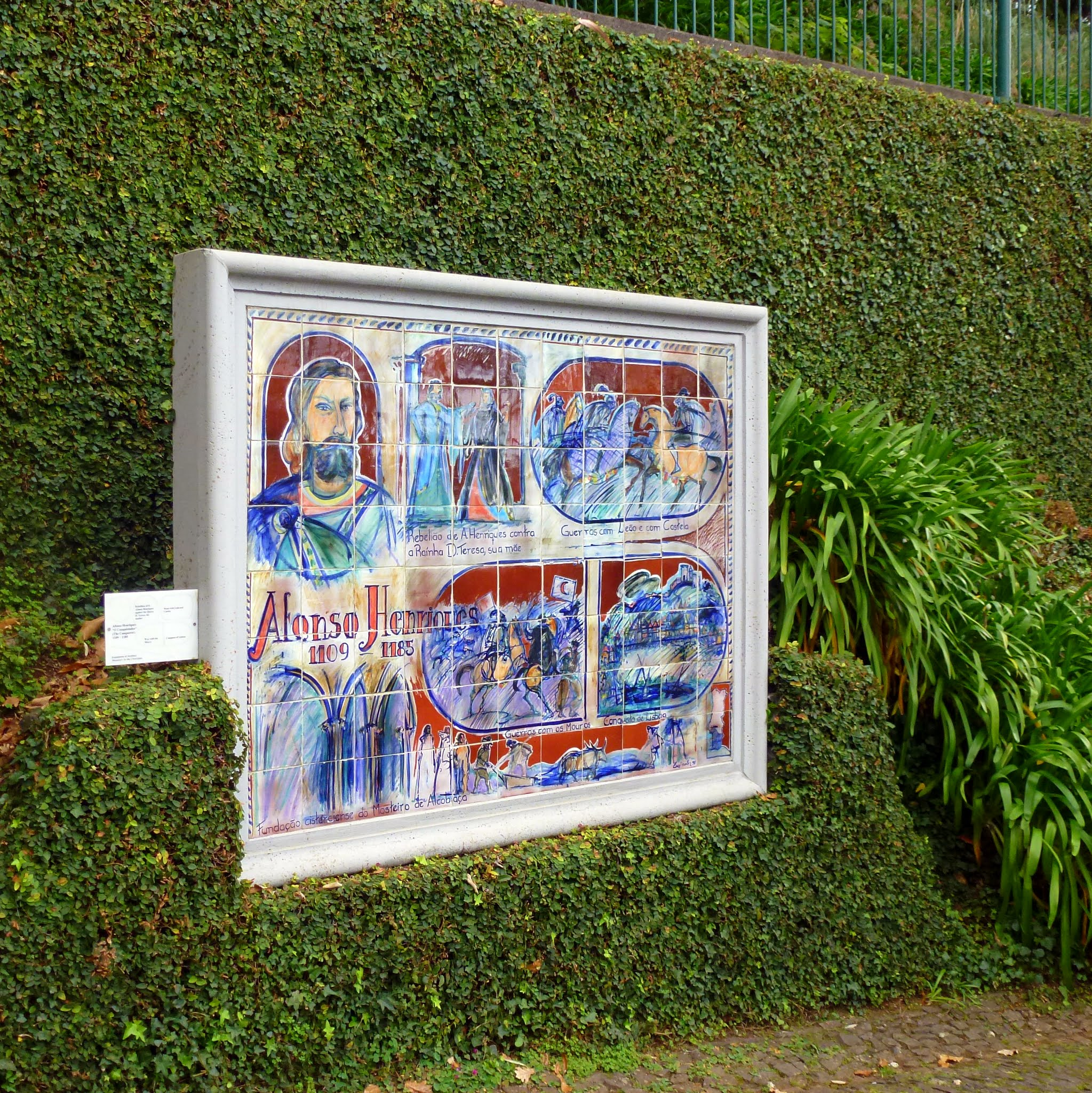 Monte Palace Tropical Gardens, Funchal, Madeira, Portugal